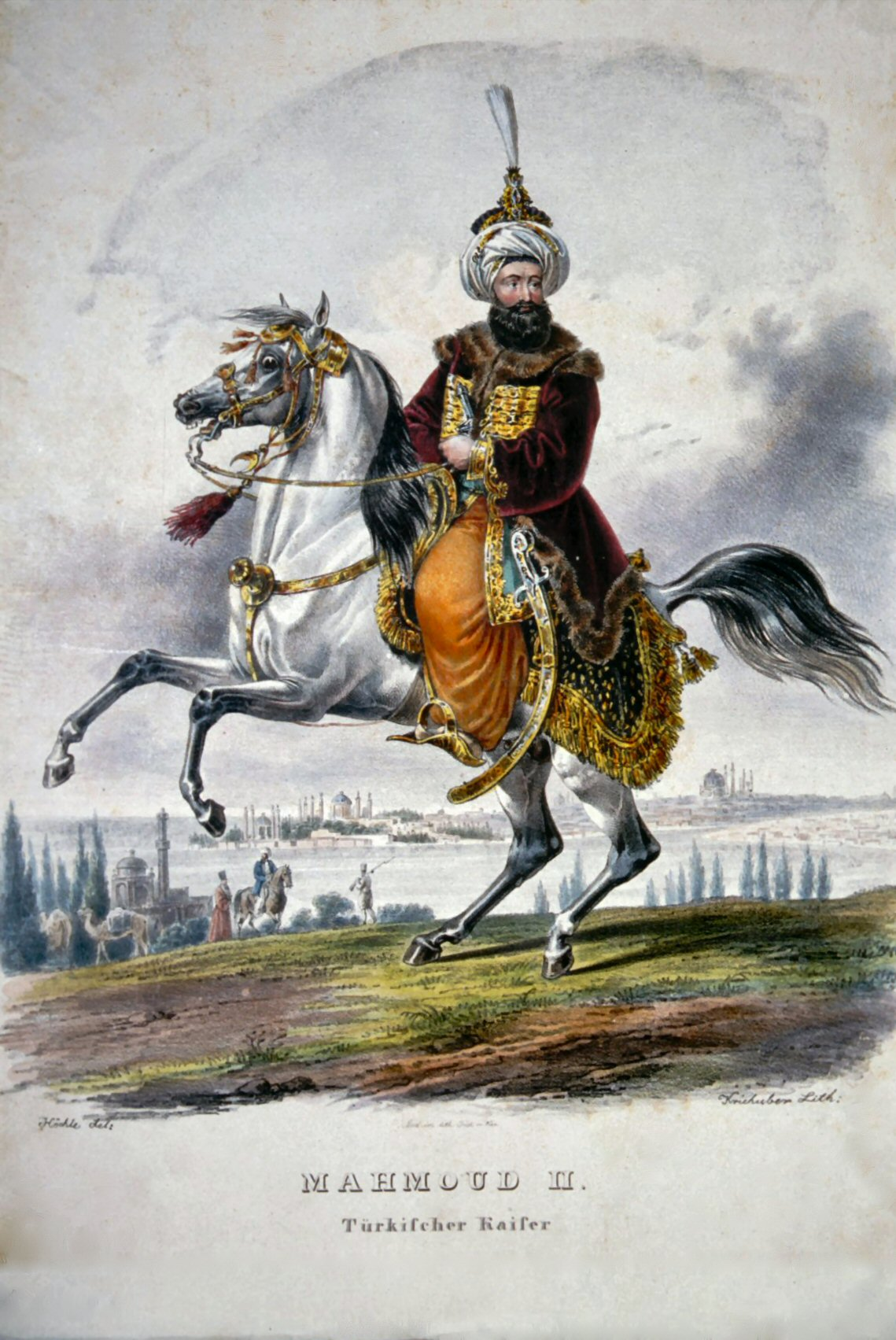 Mahmud II. (1785-1839), Sultan des Osmanischen Reiches. Lithographie von Josef Kriehuber, nach Hoechle.